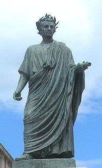 Statue d'Horace à Venose (Italie)